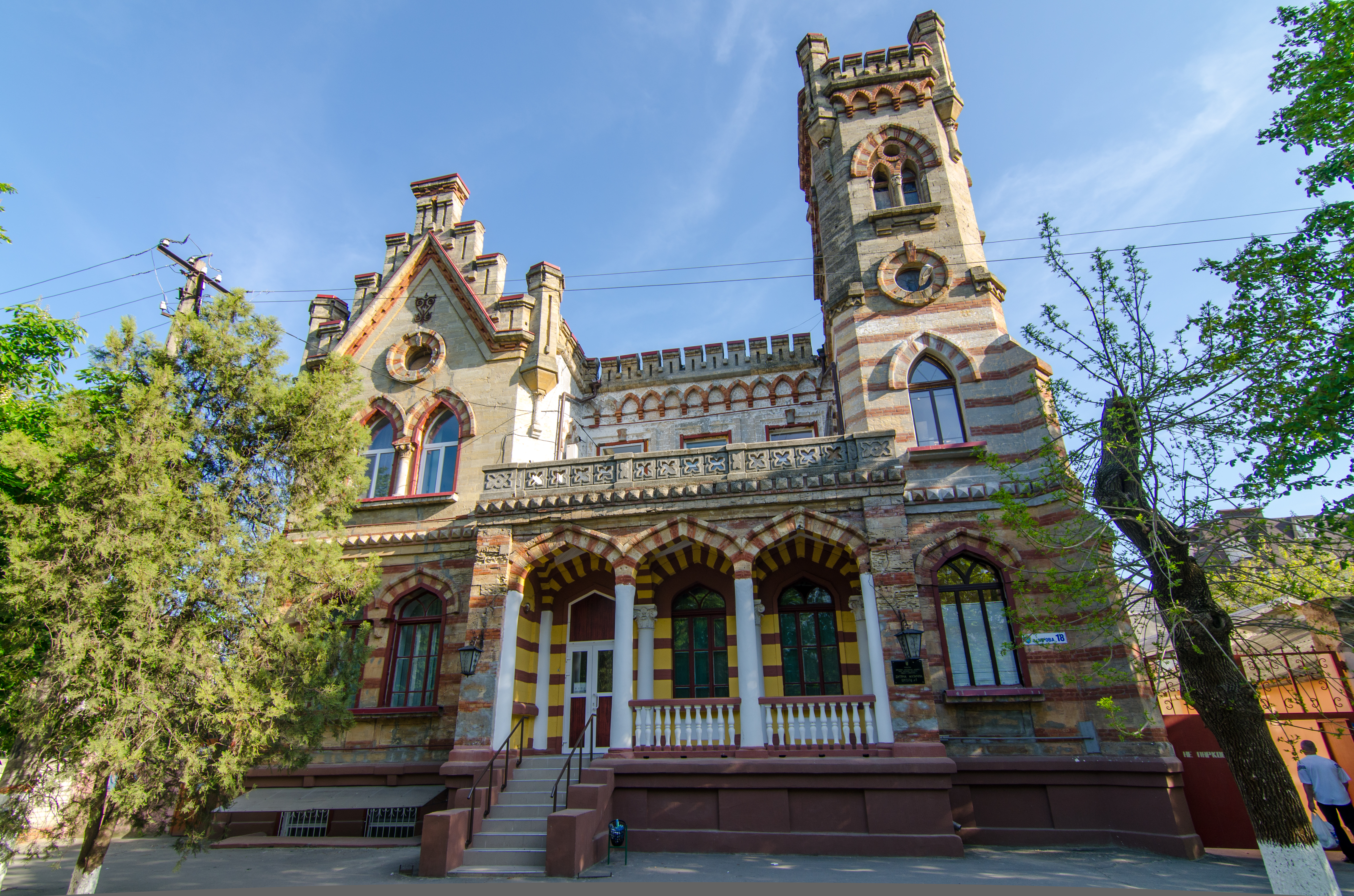 Будинок голови міської думи (нині - музична школа), Херсон, Кірова вул., 18